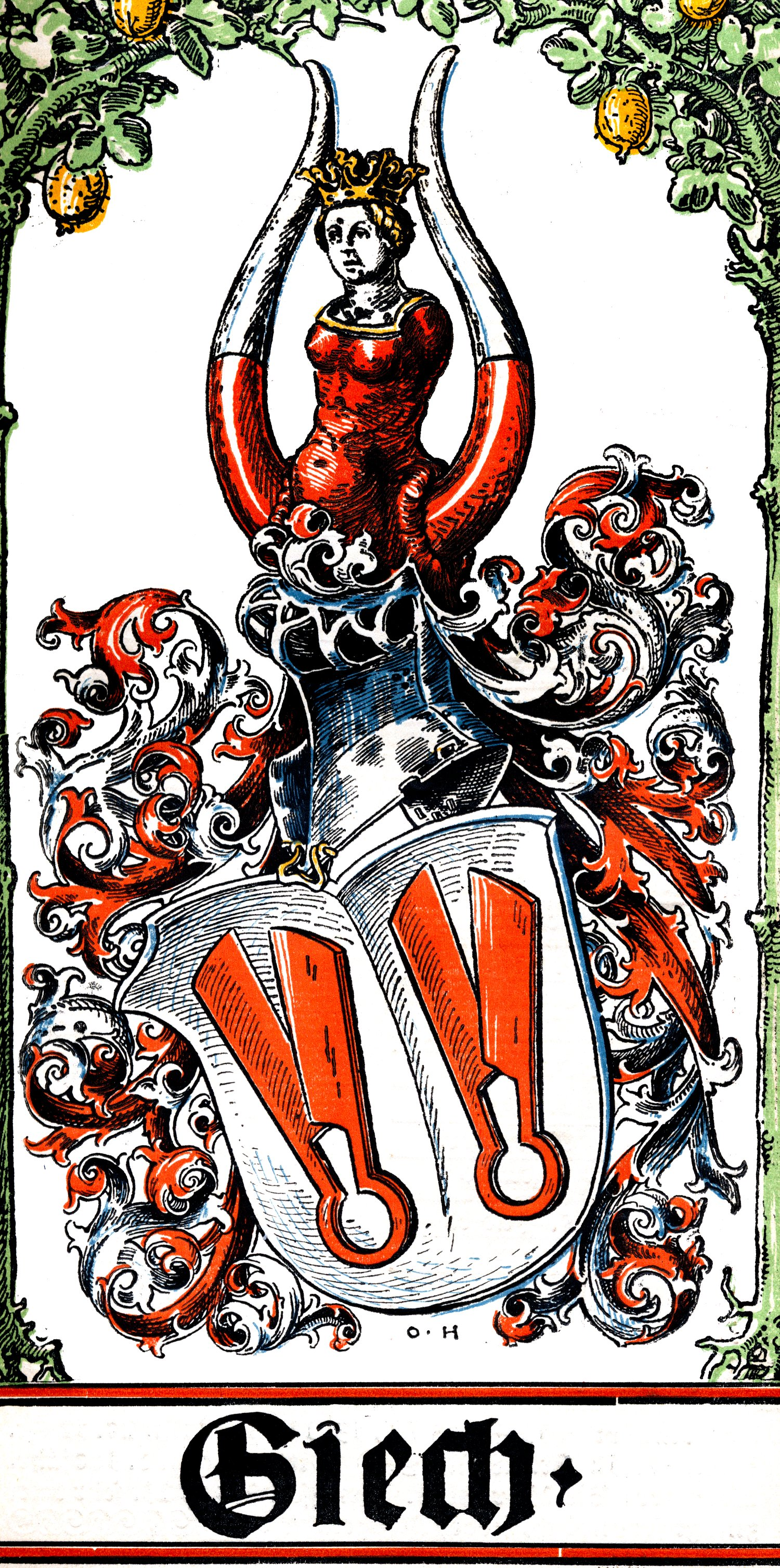 Wappen derer von Giech